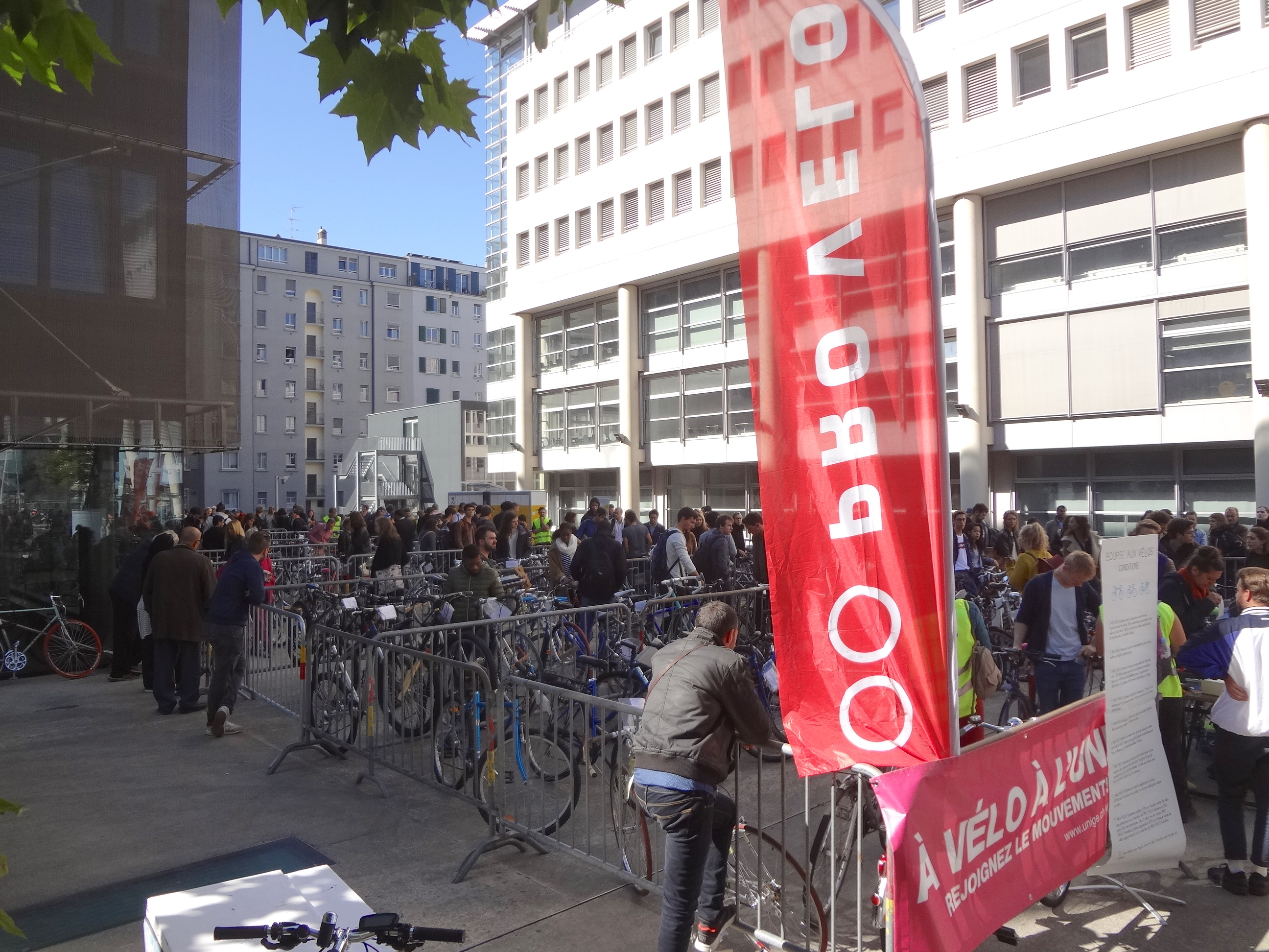 Bourse aux vélos devant Uni-Mail (bâtiment de l'université de Genève), à Plainpalais, organisée par la section genevoise de Pro Velo Suisse.